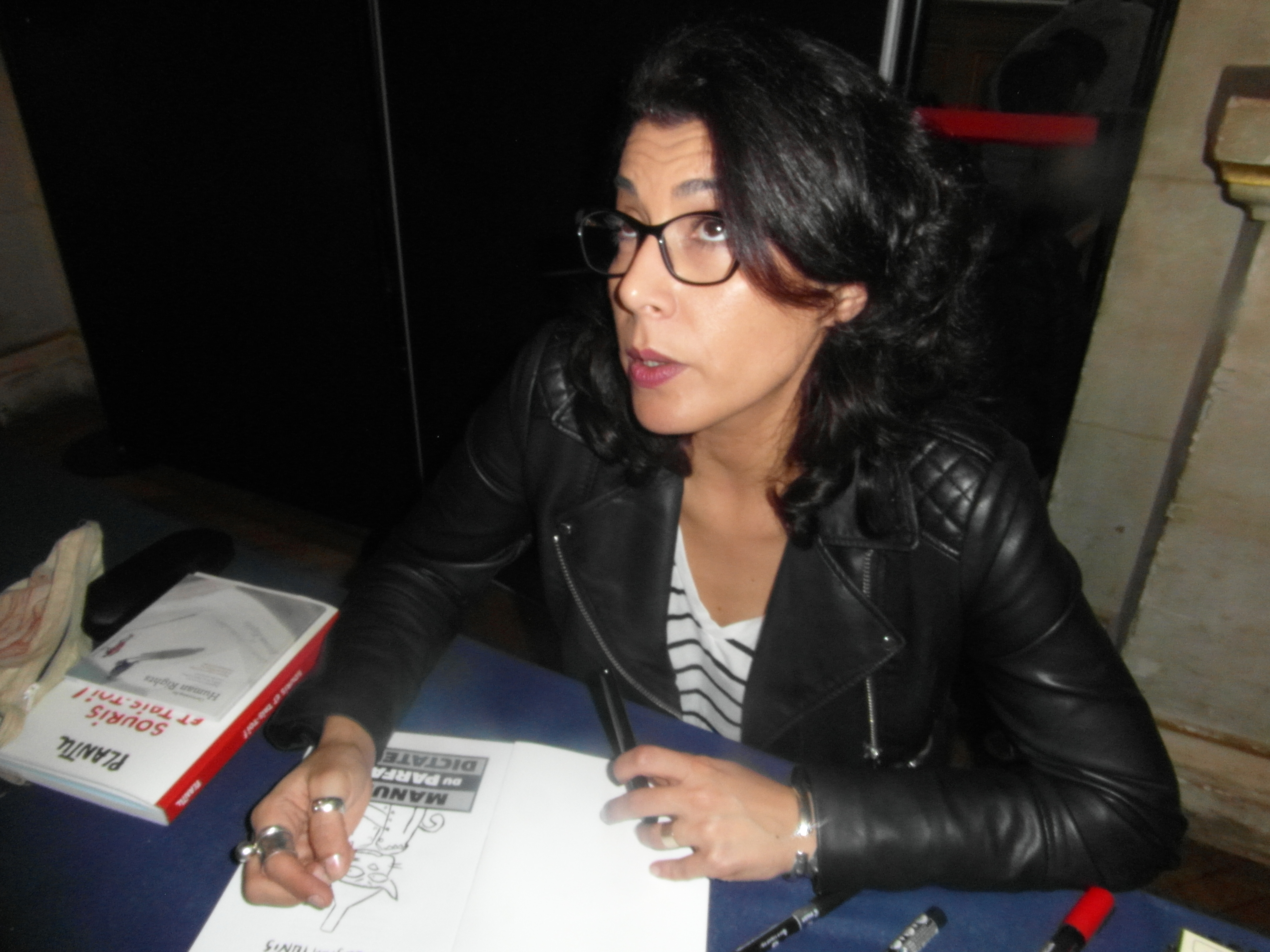 22e Maghreb des Livres, 13 et 14 février 2016